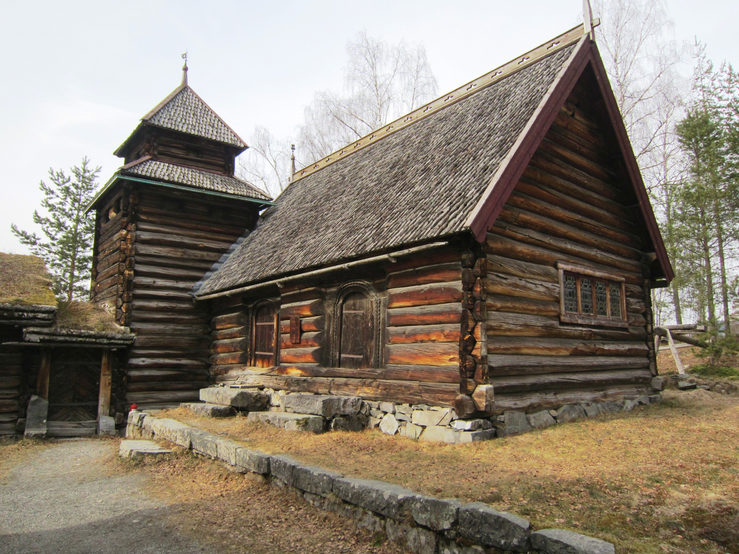 Det såkalte Isumkapellet eller Isumlåven på Maihaugen